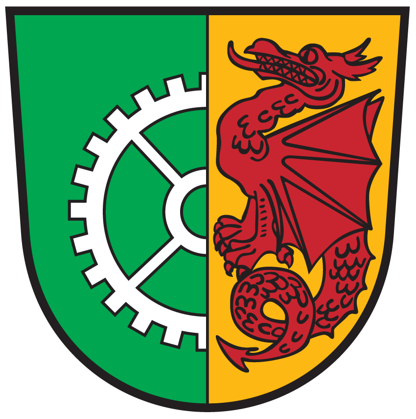 Wappen von Ferndorf